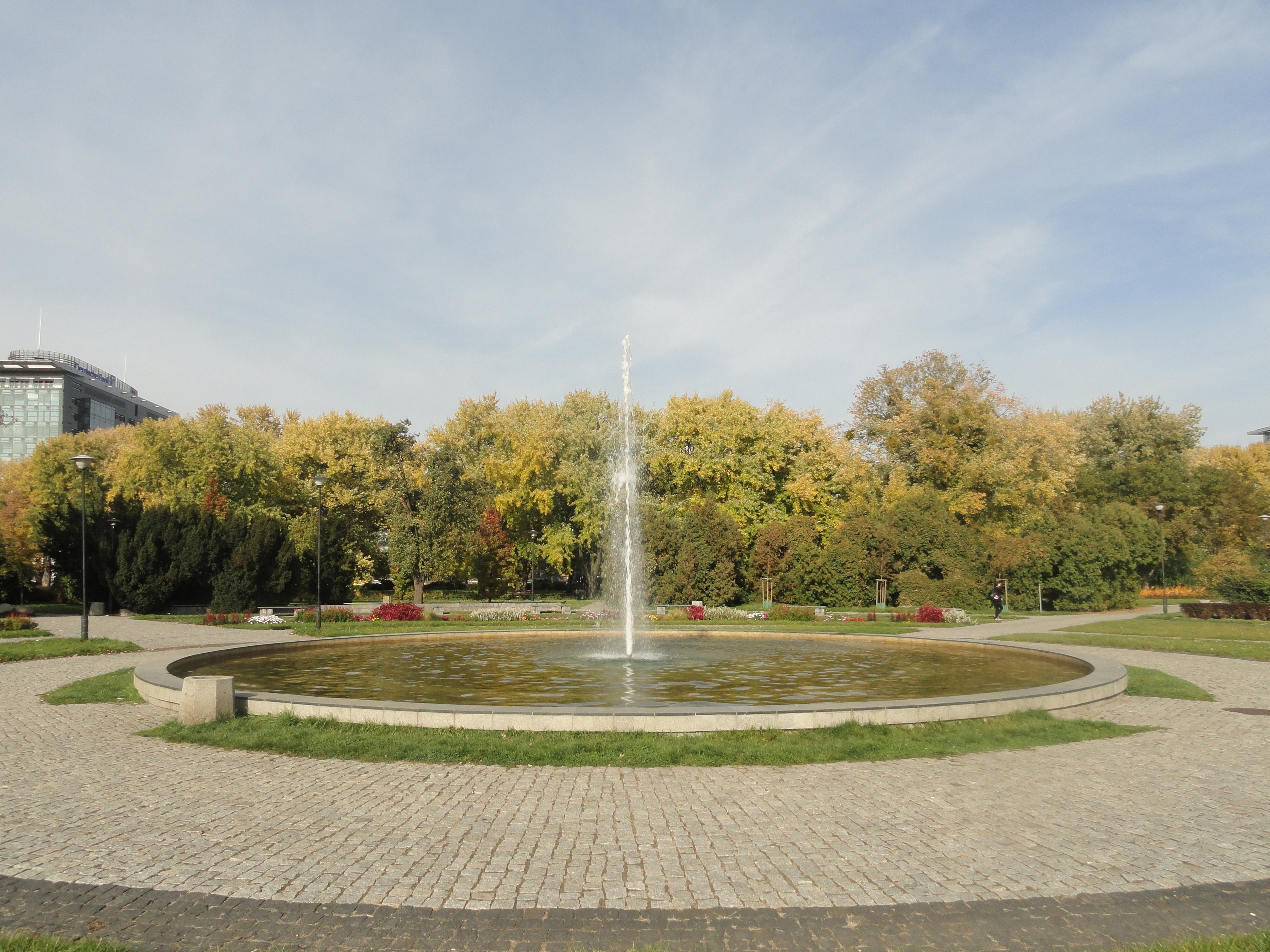 Park Pole Mokotowskie w Warszawie, część w Śródmieściu, fontanna.